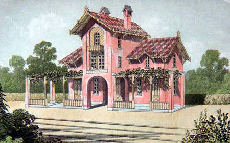 Conceptteking van het stationsgebouw te Zandbergen